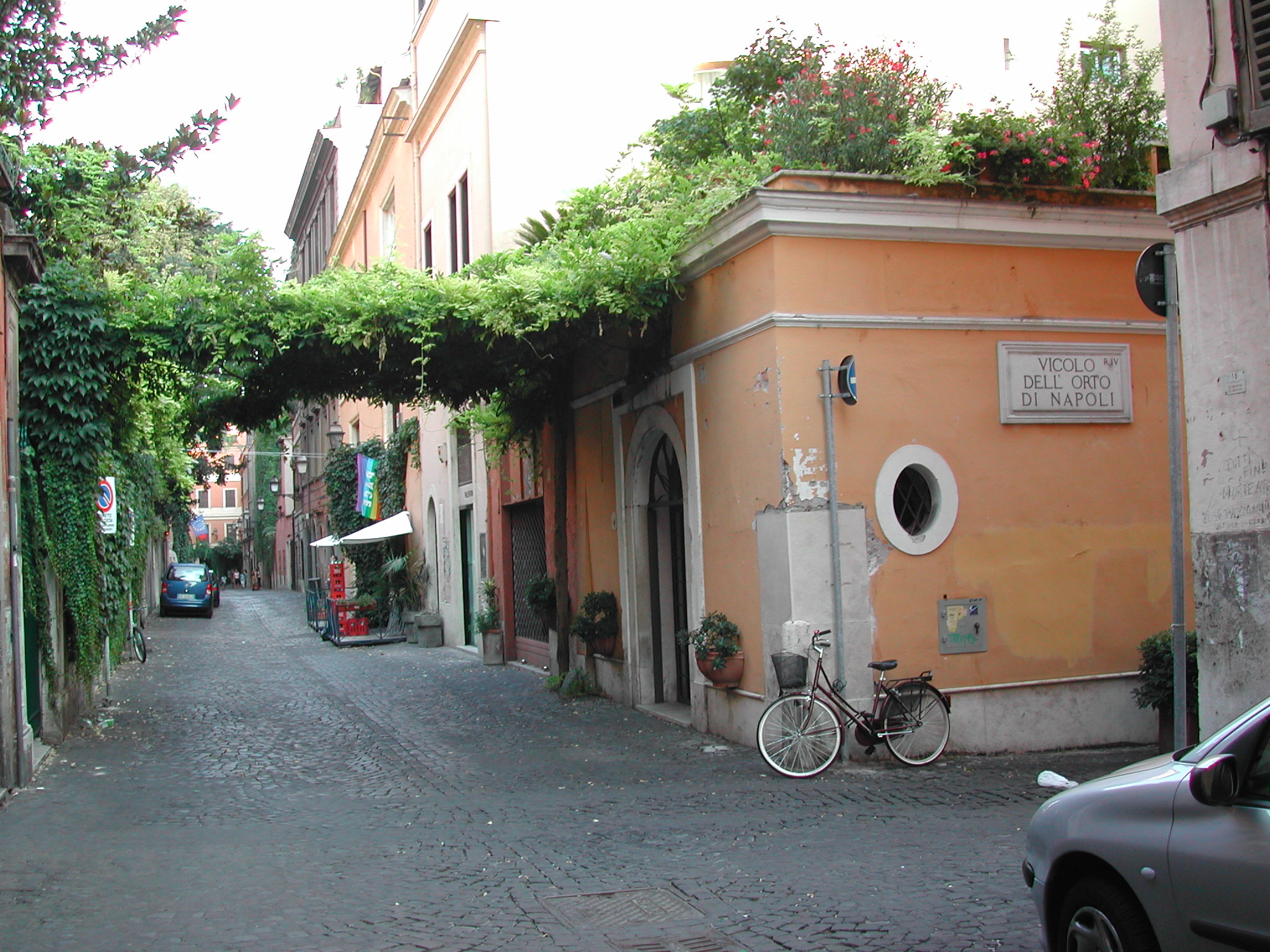 Roma, via Margutta Licensing